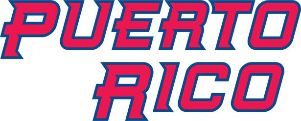 Puerto Rico national baseball team uniform logo